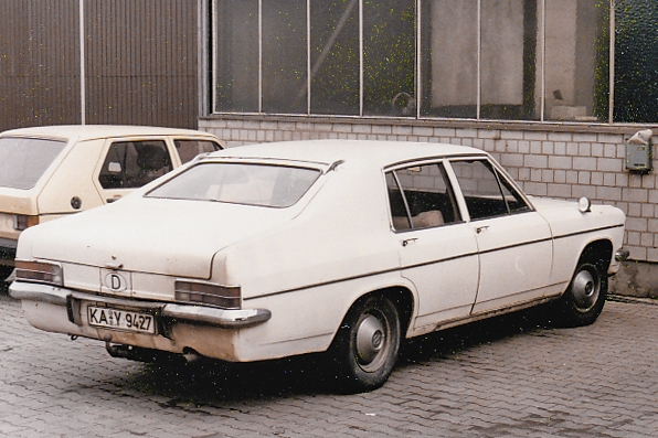 Fastback-Limousine mit Schrägheckklappe (Karosseriebetrieb Vogt, Bad Neuenahr)